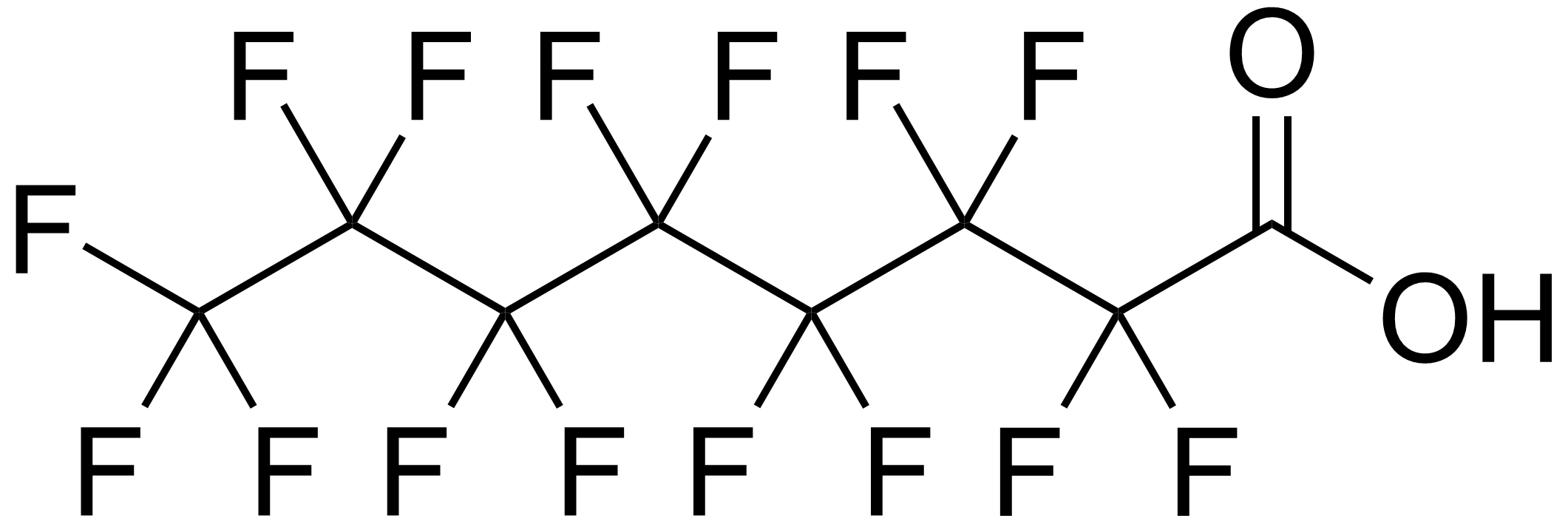 chemical structure of perfluorooctanoic acid